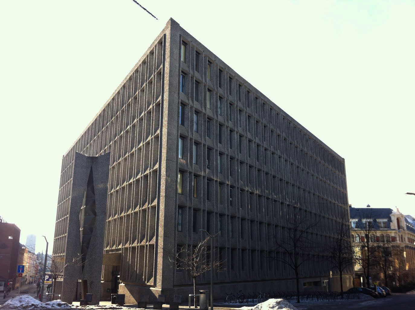 Bygningen: (tidligere) Oslo helseråds bygning, St. Olavs plass 5, Oslo. Byggeperiode: 1956–69. Arkitekt: Erling Viksjø og Inge A. Dahl. Materiale: Sandblåst naturbetong. Skulptur: "Tetraeder" Billedhugger: Ramon Isern. 1969. Materiale: Sandblåst naturbetong